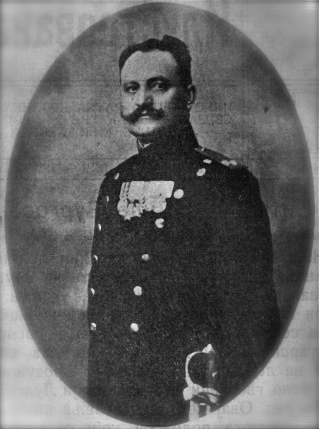 Пуковиник Петар Пешић у штабу 1. армије Илустрована Ратна Кроника 1912-193, свеска 6, 22. новембар (5. децеммбар) 1912, стр. 42